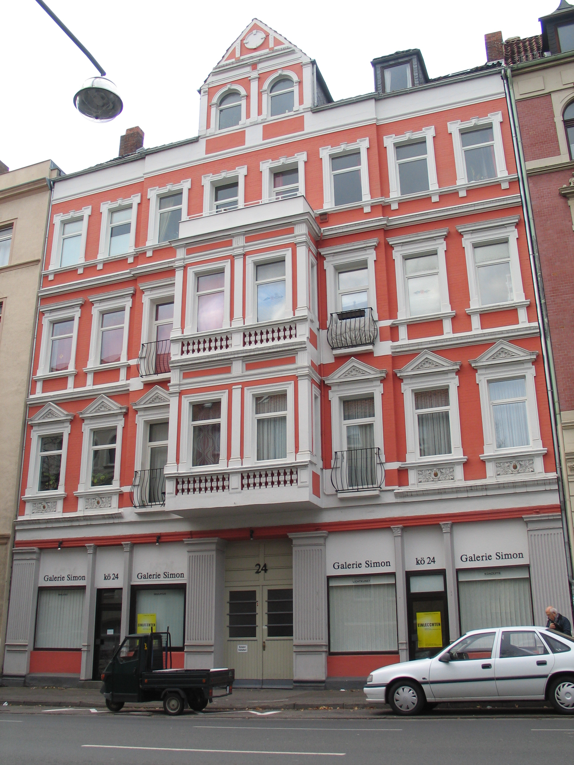 Das Gebäude mit der Galerie Simon - Kö 24 des Kunstsammlers Robert Simon war Ausgangspunkt für die spätere Skulpturenmeile in Hannover ...